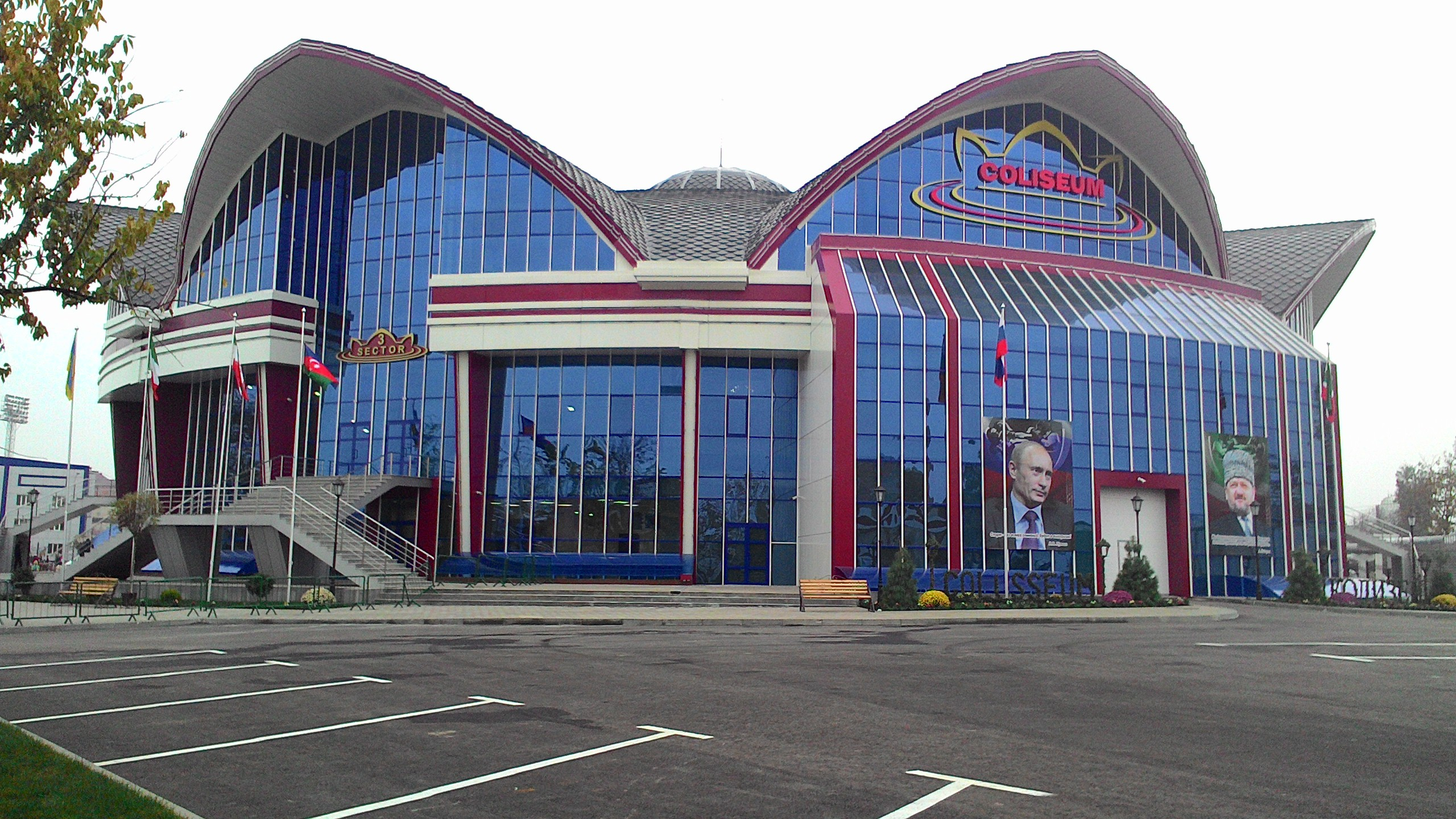 Грозненский Колизей